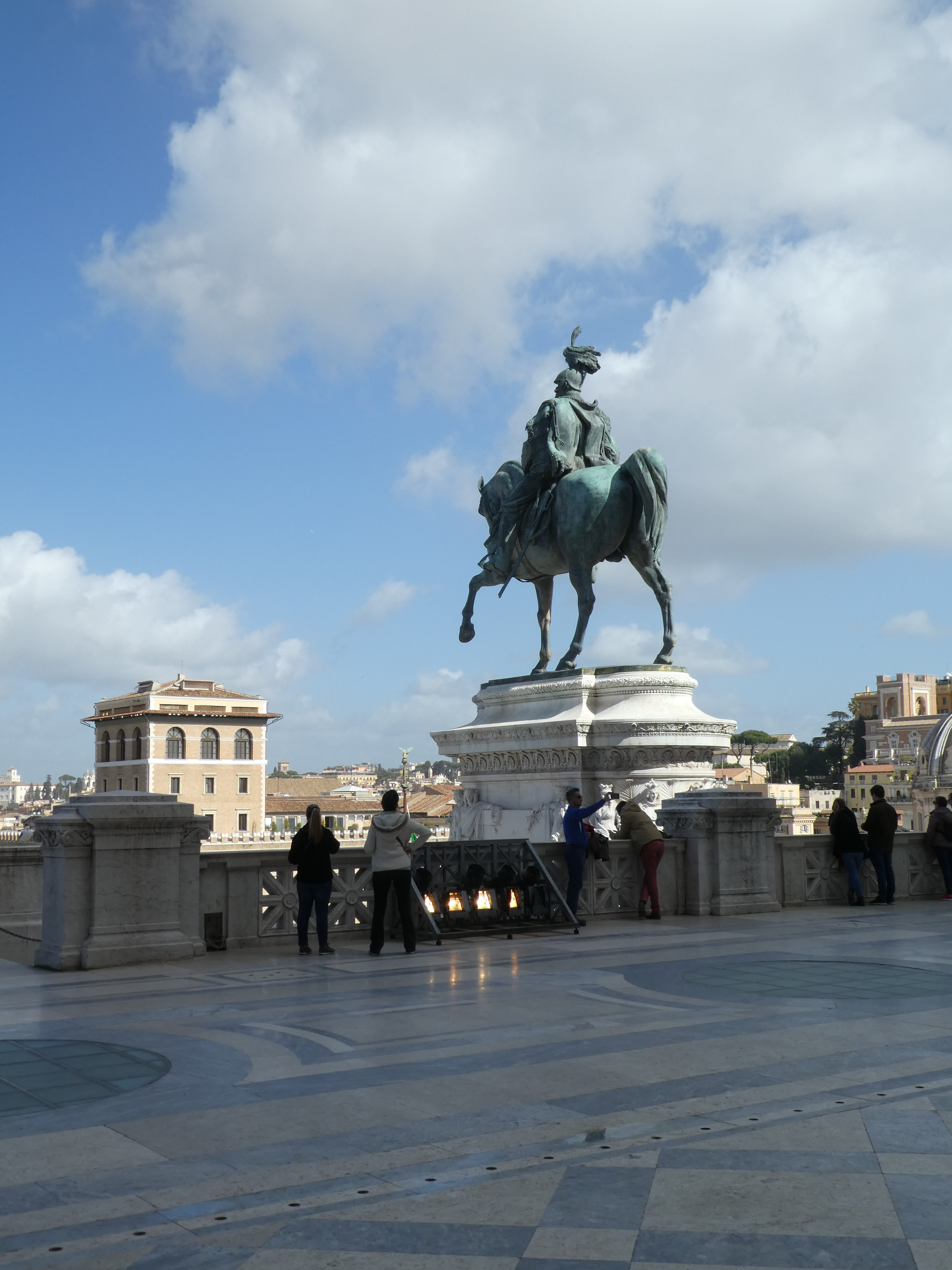 vedi titolo